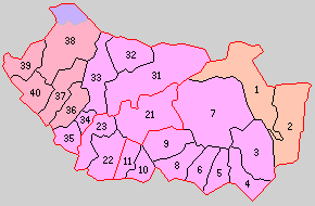 後の福岡県朝倉郡域の町村制時点の町村。